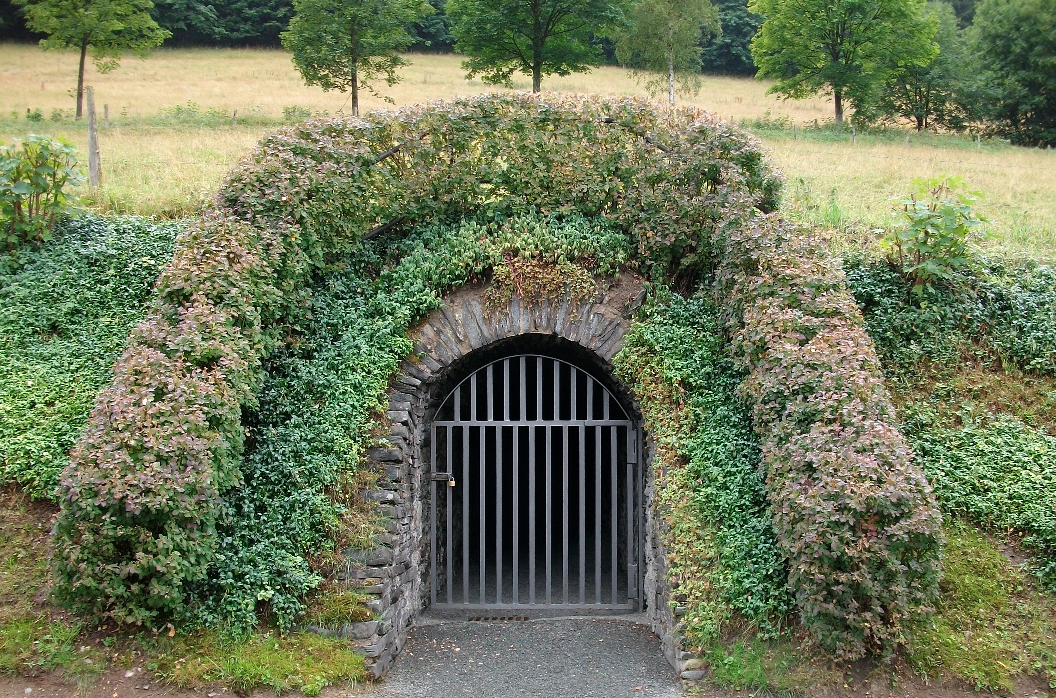 Schmallenberg-Nordenau, Stolleneingang an der Astenstraße (Germany)